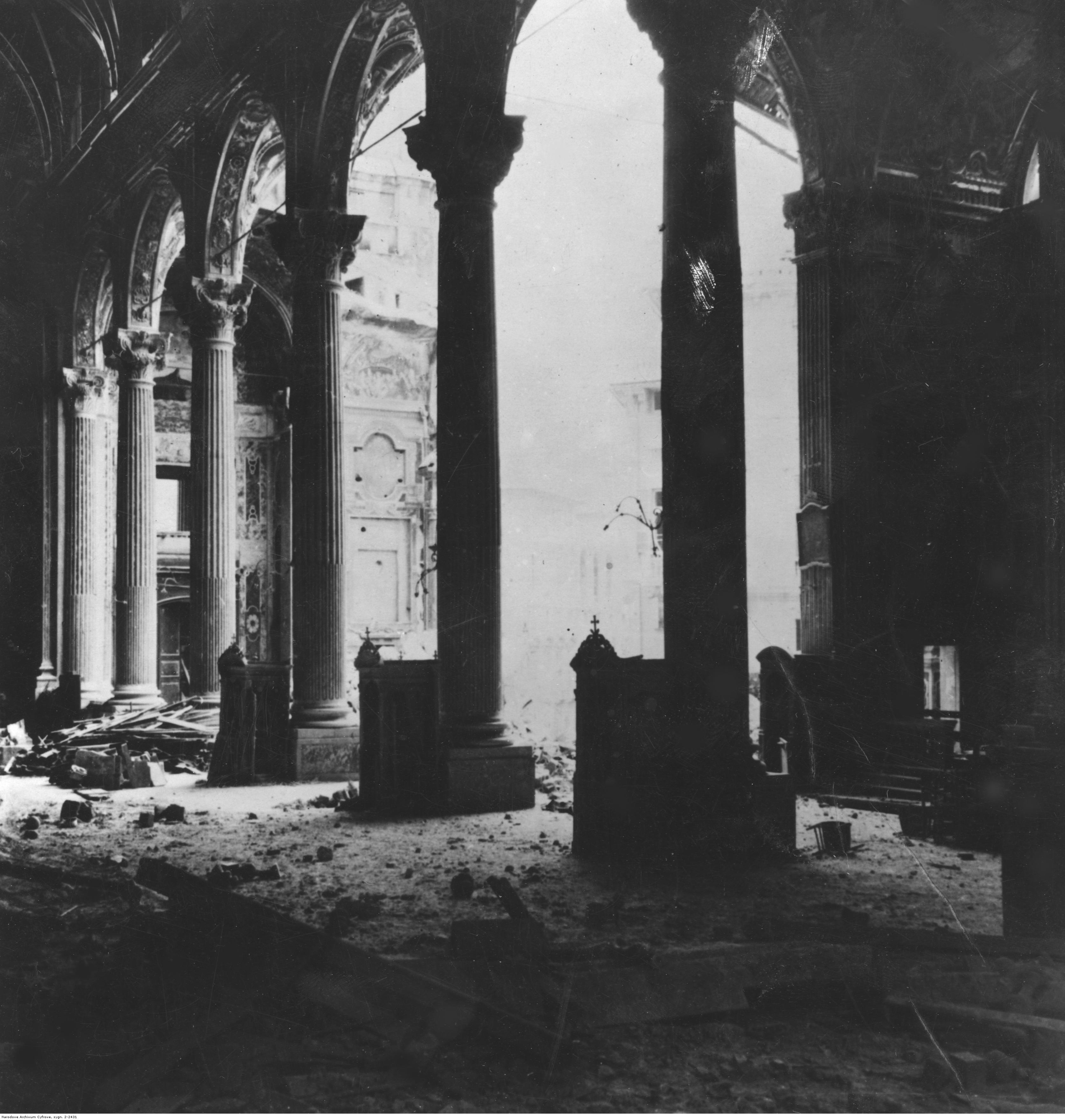 Genua. Wnętrze zniszczonego kościoła Zwiastowania (Chiesa della SS Annunziata).